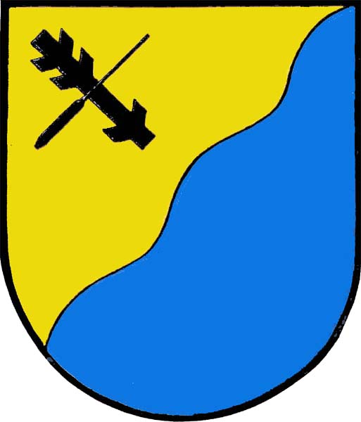 Znak obce Kytlice